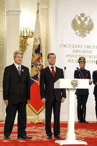 Дмитрий Медведев, Анатолий Черепащук. Церемония вручения Государственных премий Российской Федерации